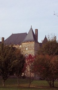 Château du XVème siècle restauré par M Paul Bailly à partir de 1977. Vue depuis le parc. Visites possibles. Doumely-Bégny, Ardennes (08),France.